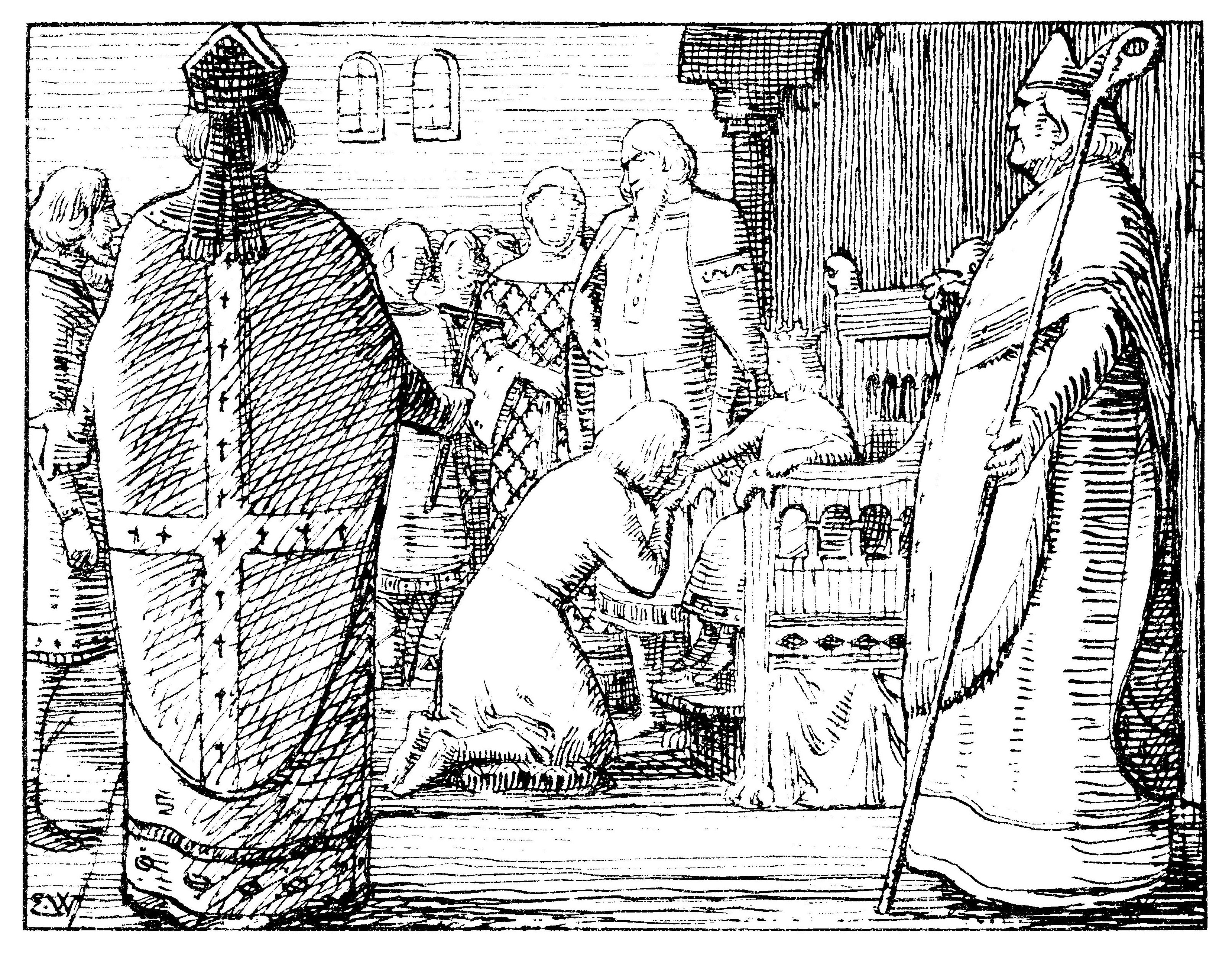 Erik Werenskiold: Illustration for Magnus Erlingssons saga, Heimskringla 1899-edition. nn: «Kongen tek hyllest av lendmennene etter vigsla.»